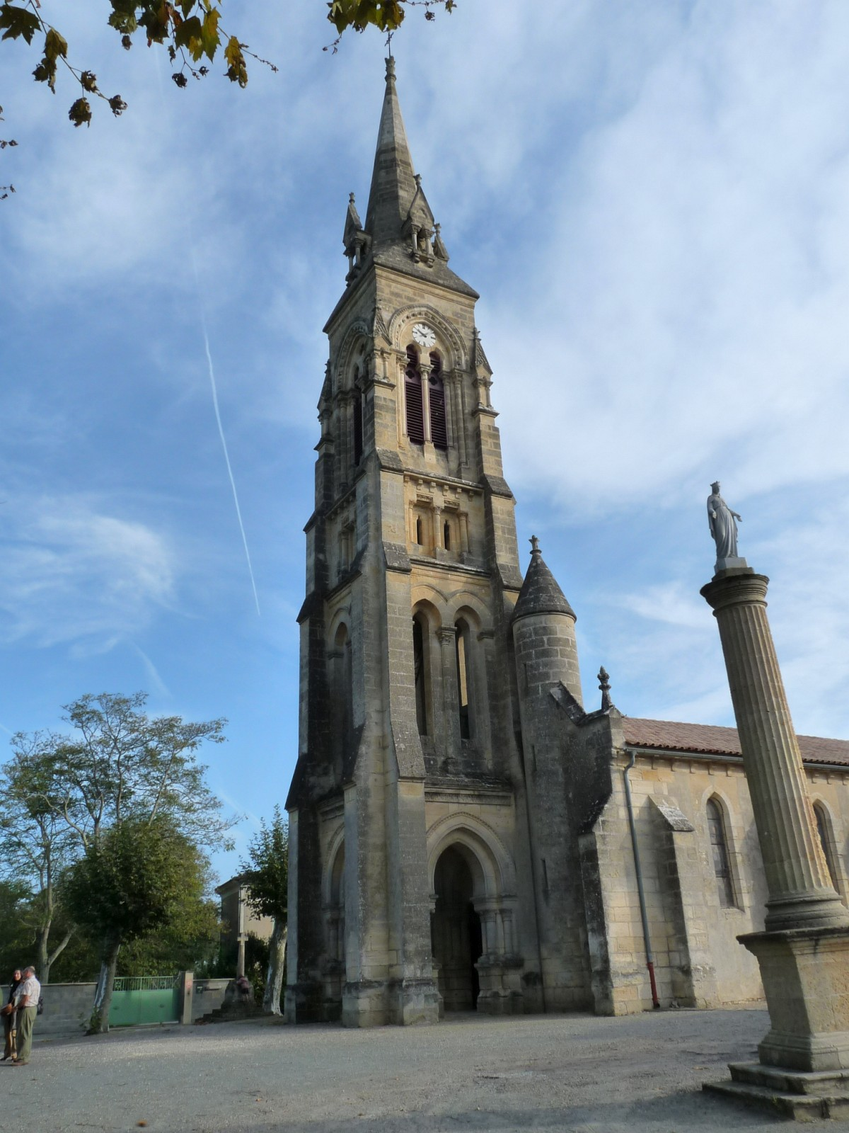 Eglise (et colonne de la Vierge) de Saint-Girons-d'Aiguevives, Gironde, France